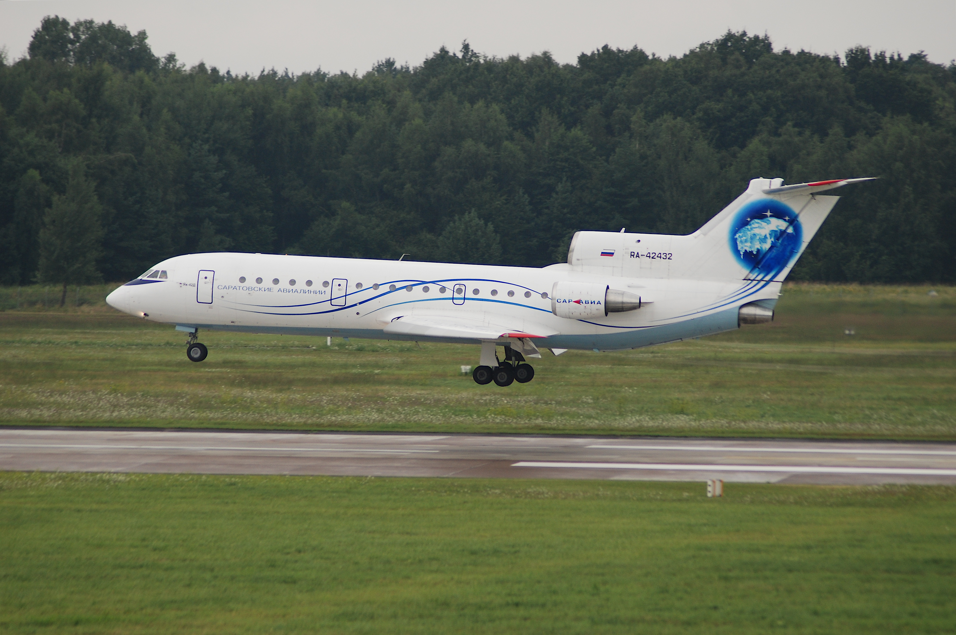 Saravia Yakovlev Yak 42; RA-42432@HAJ;28.07.2007/482cd